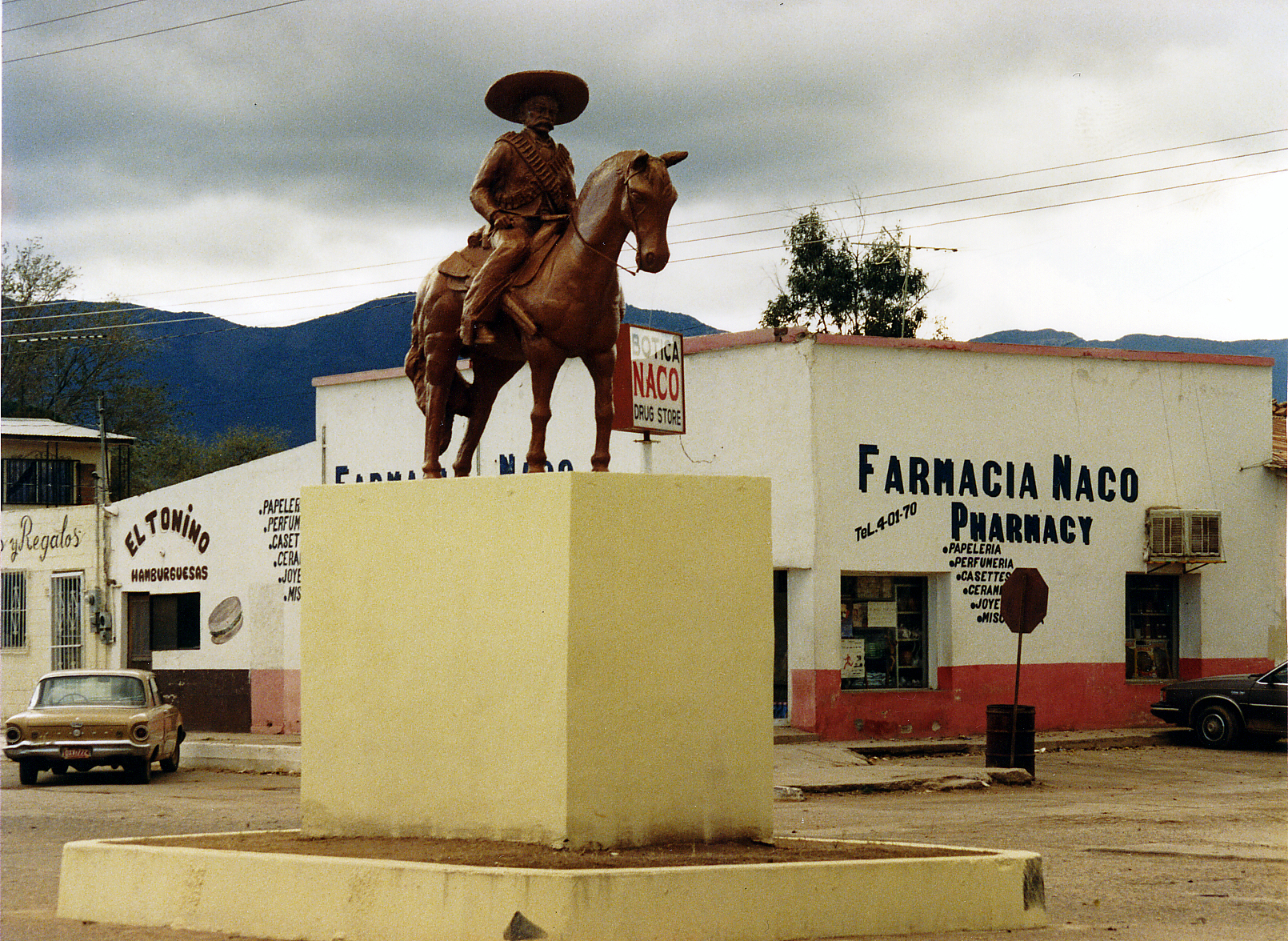 Naco, Sonora, Mexico 1990